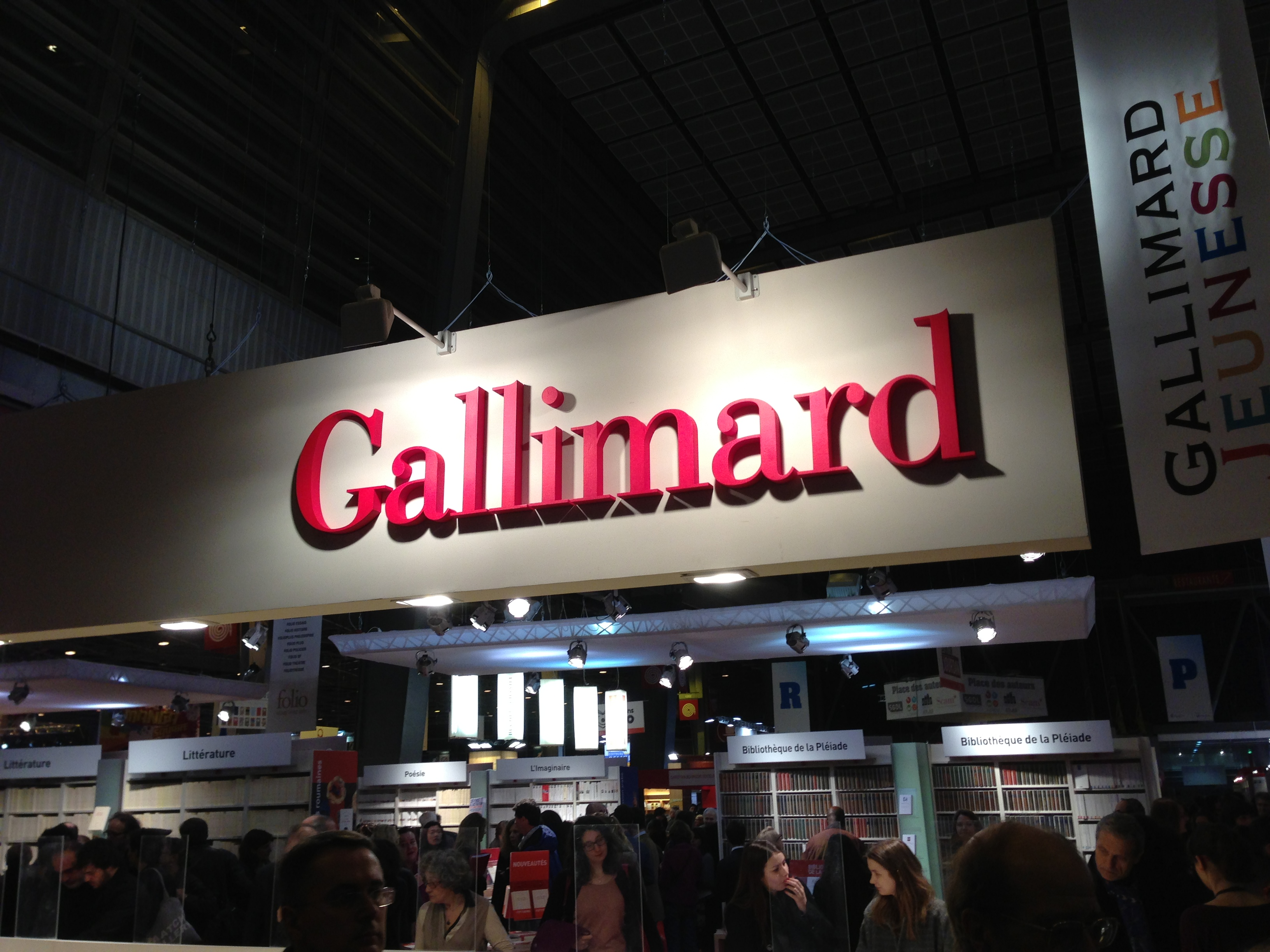 Editions Gallimard Salon du livre de Paris 2013 Salon du livre de Paris, 2013.